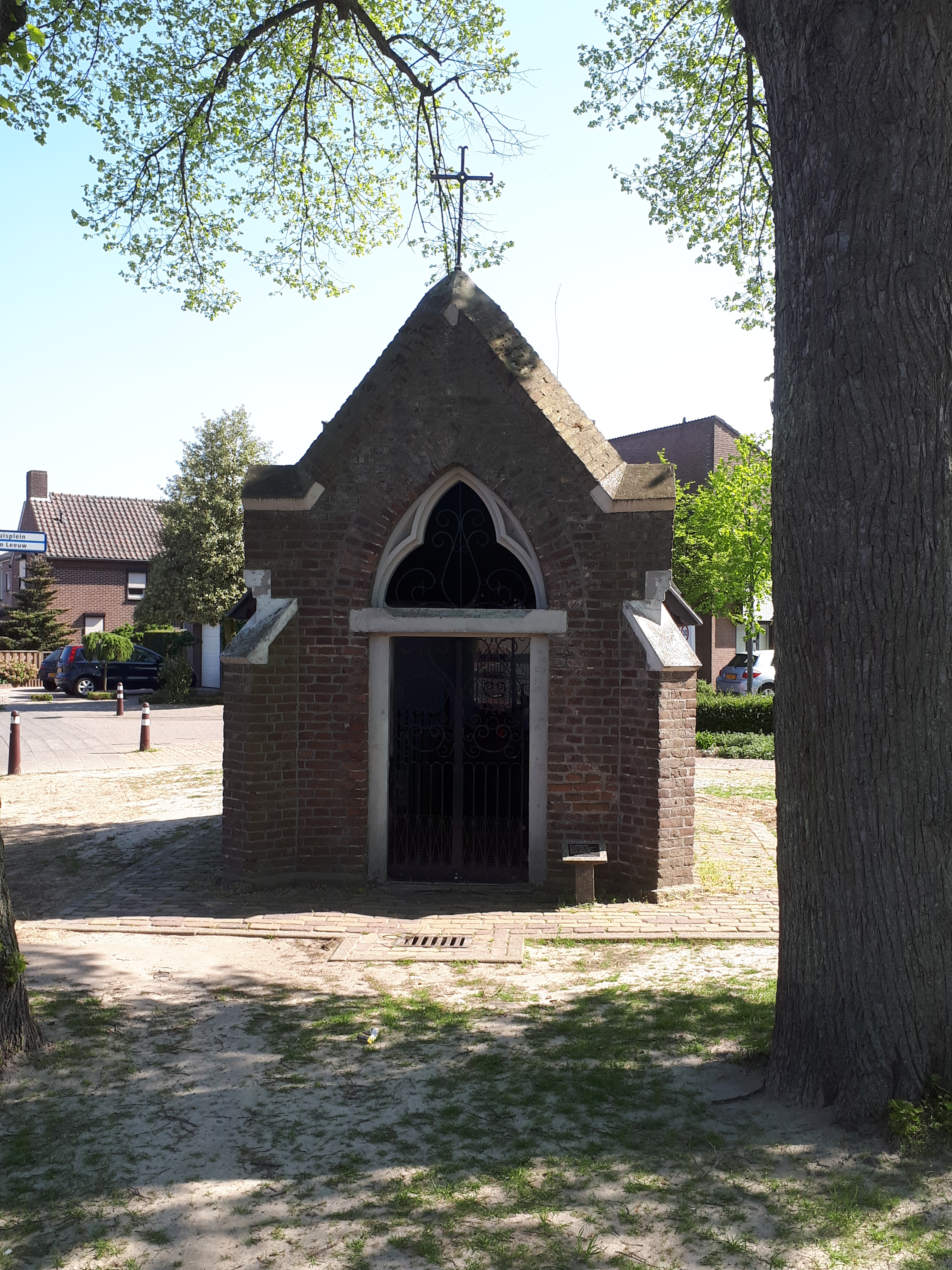 Veldkapel, Langeweg-Kennedystraat (Venray)